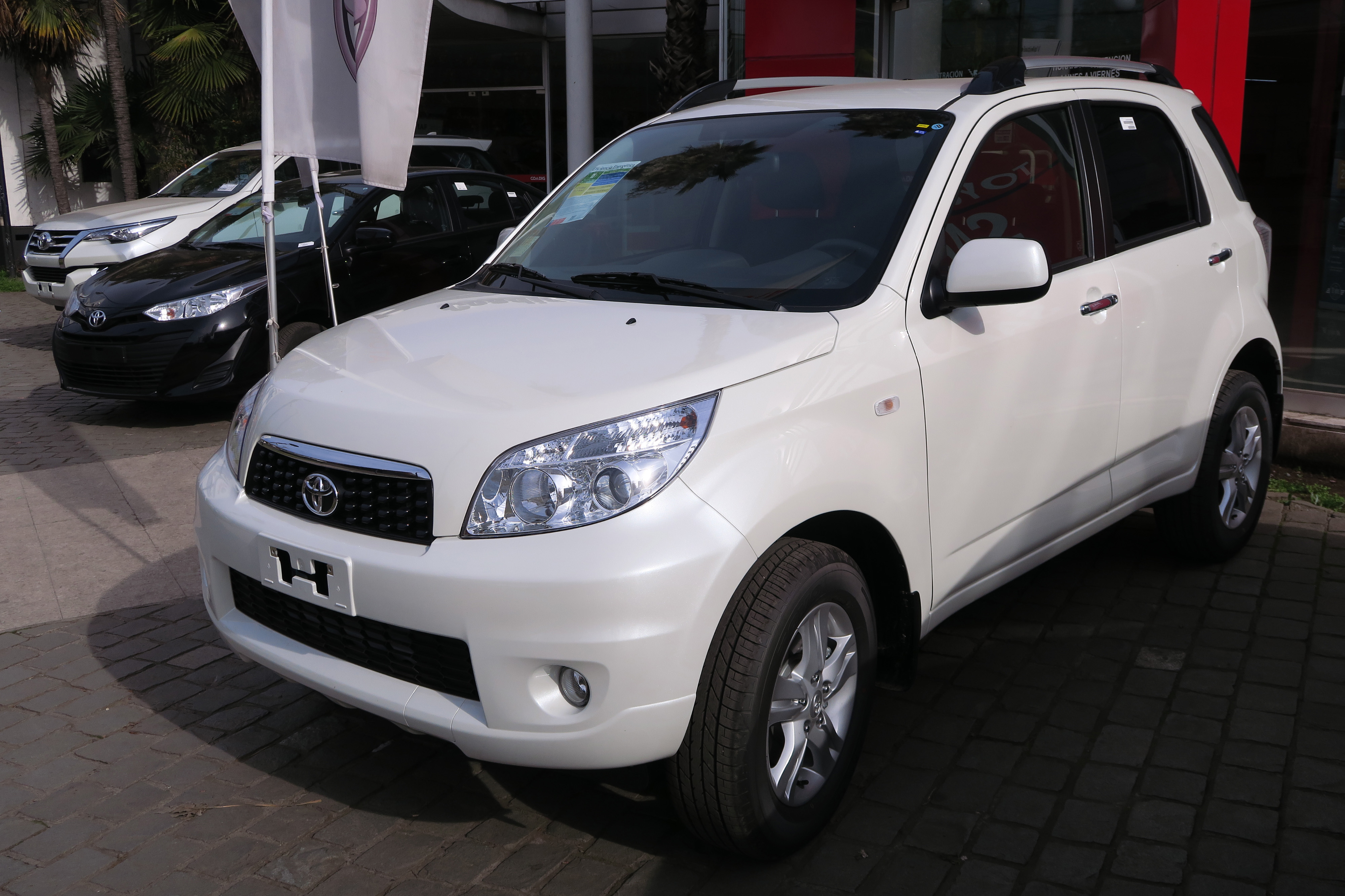 Toyota Rush 1.5 LEi 2018